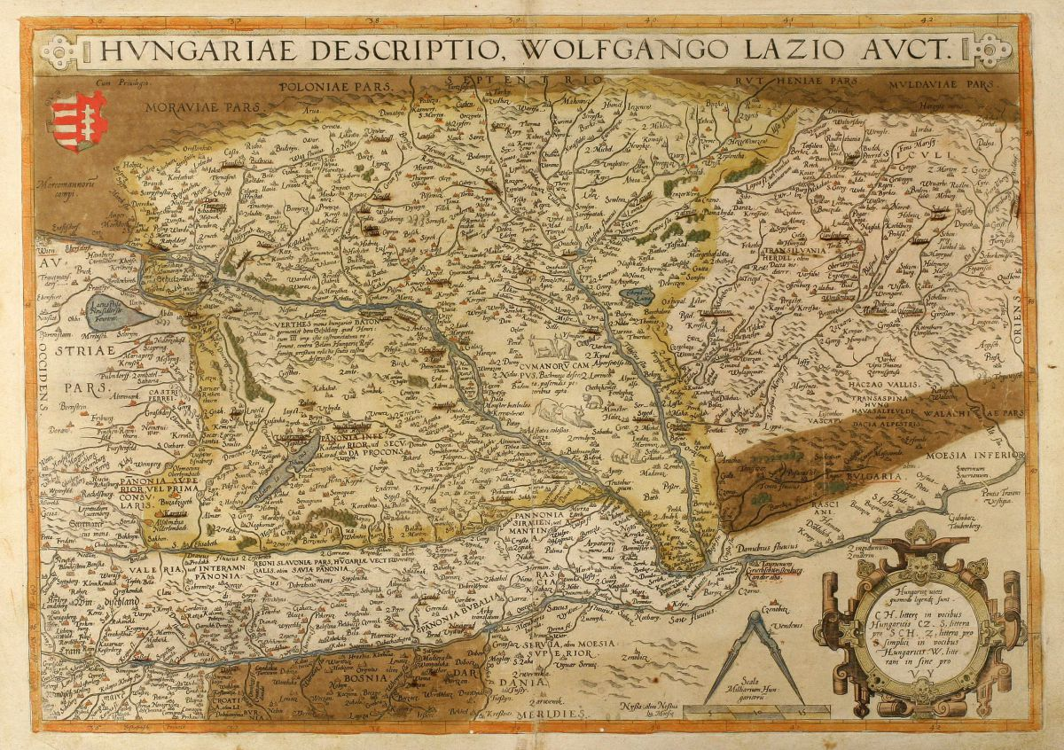 Wolfgang Lazius nagy Magyarország-térképe (Bécs, (1552), 1556))